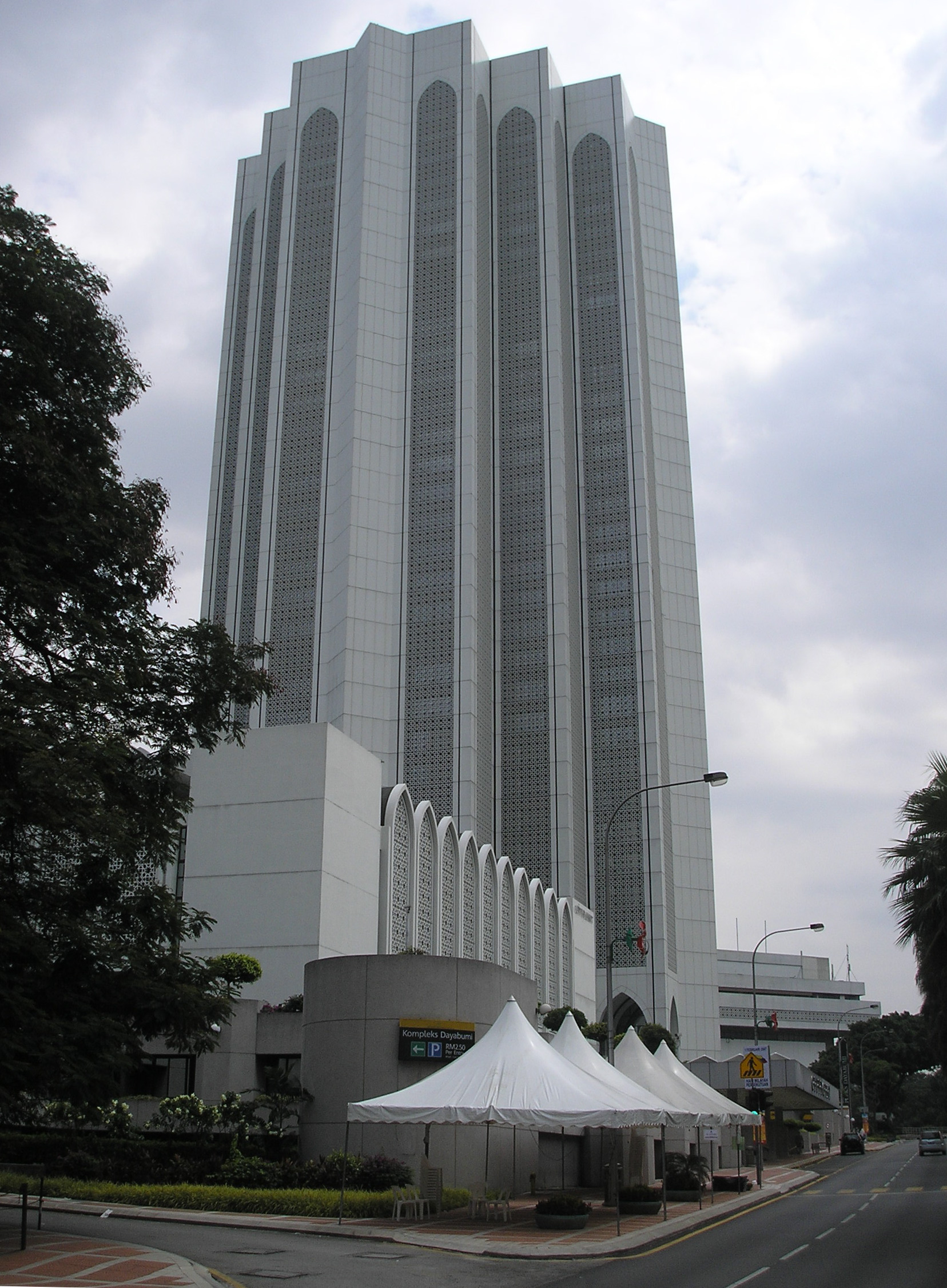 The Dayabumi complex, Kuala Lumpur, Malaysia.